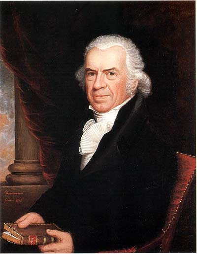 Isaiah Thomas